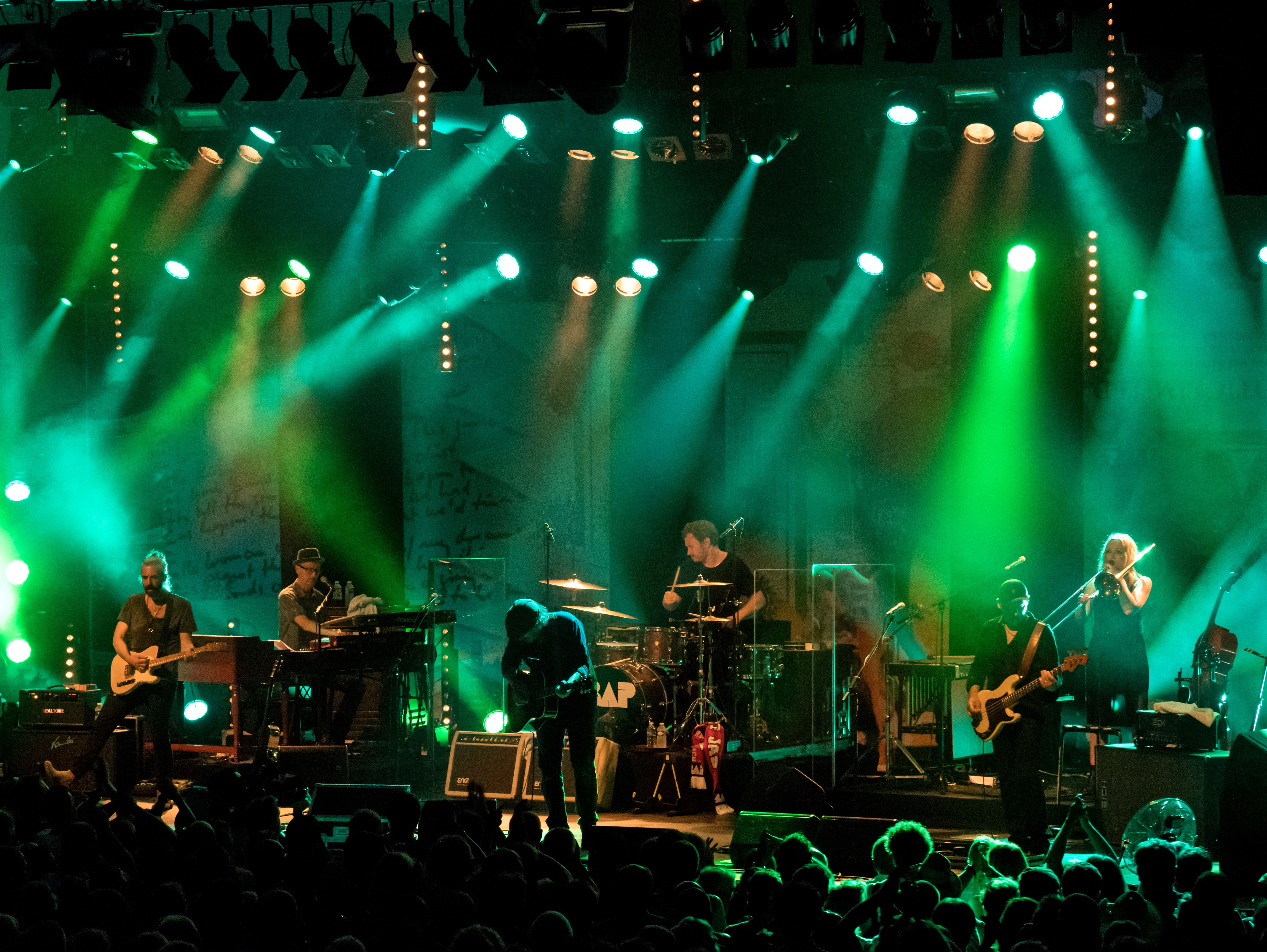 Bilder vom Zelt Musik Festival 2016 in Freiburg im Breisgau " Wolfgang Niedecken’s BAP" kurz BAP